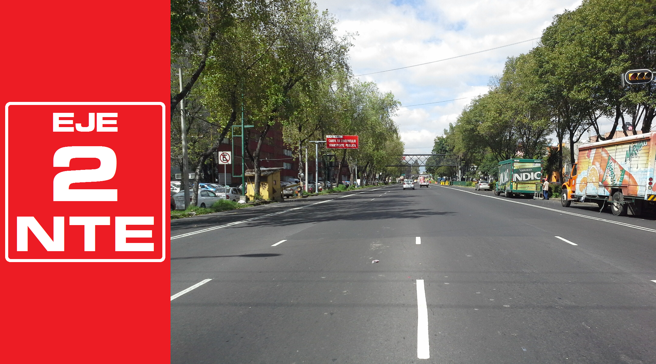 Rediseñado original de la señalética de los Ejes viales de la Ciudad de México por José García (Wiki ID: narumiyama)